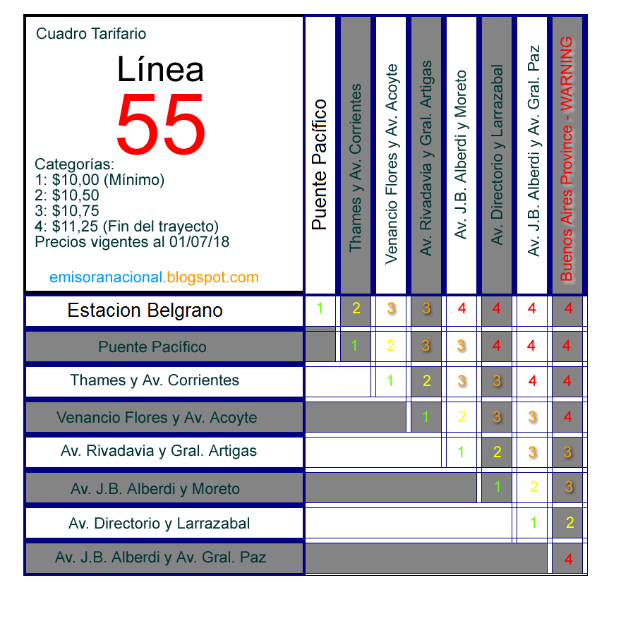 Cuadro tarifario de la linea de autobus 55 que parte desde el barrio de Belgrano y pasa hacia el sur oeste de la Provincia de Buenos Aires.